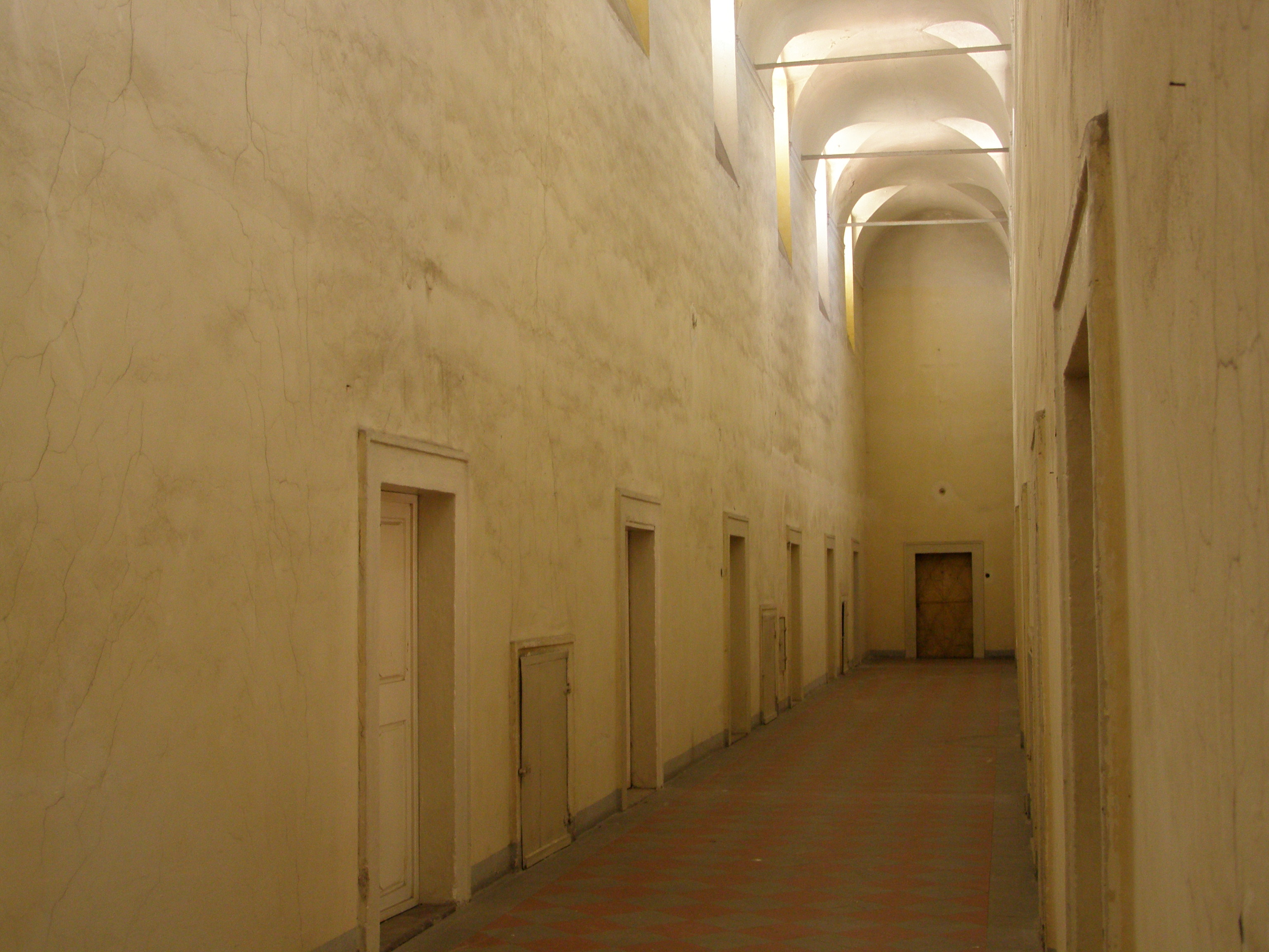 Broumov, chodby benediktinského kláštera